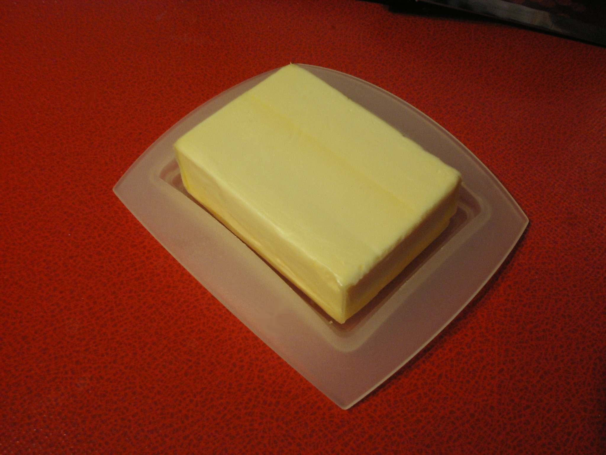 Handelsübliche Menge (250g) in einer Butterdose